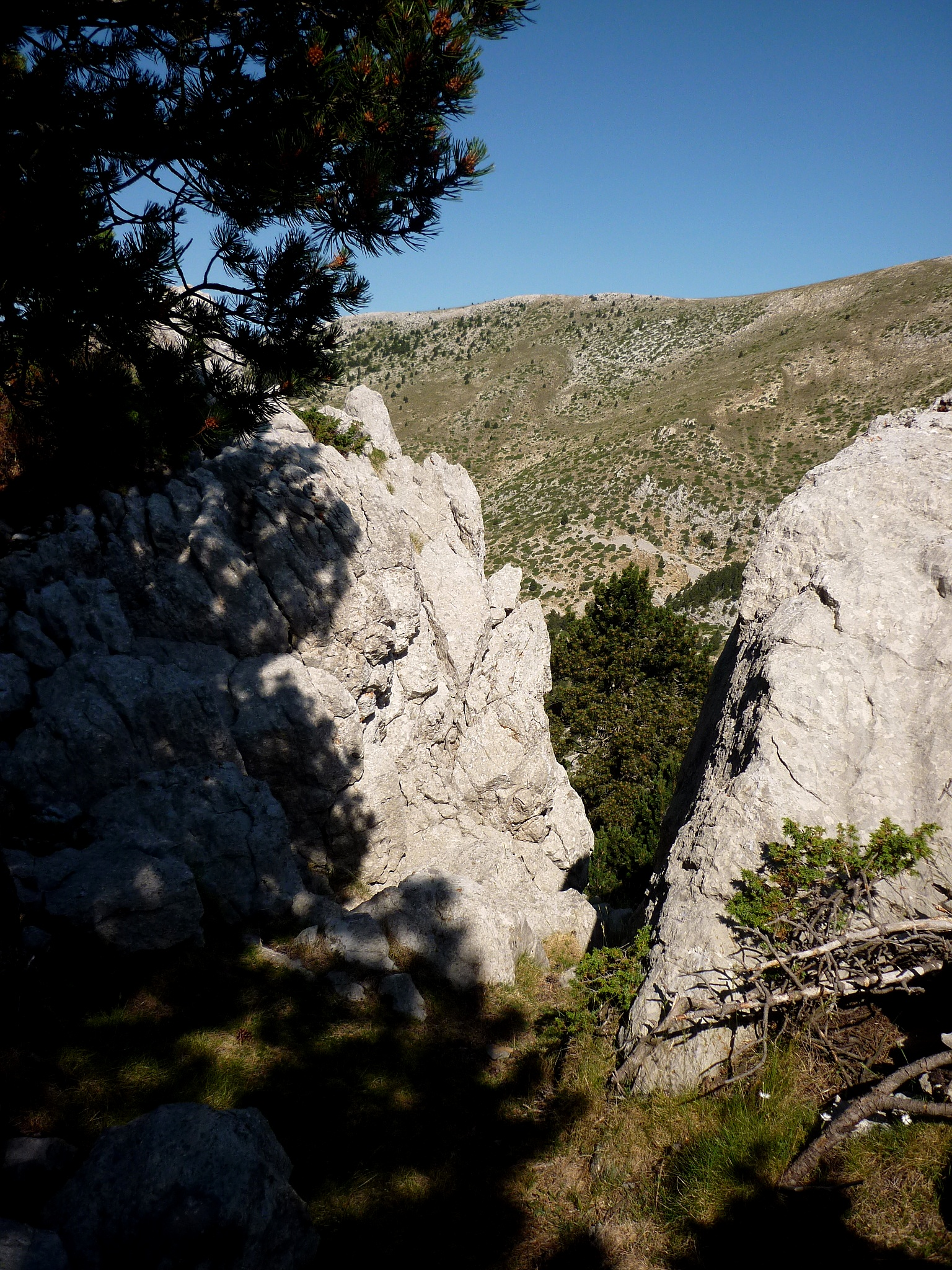 El Portell del Llop a la Costa de les Feixines. Odèn (Solsonès - Catalunya)